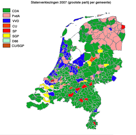 Overzicht grootste partij per gemeente bij de verkiezingen voor provinciale staten op